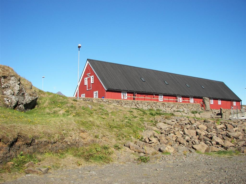 Langabúð á Djúpavogi